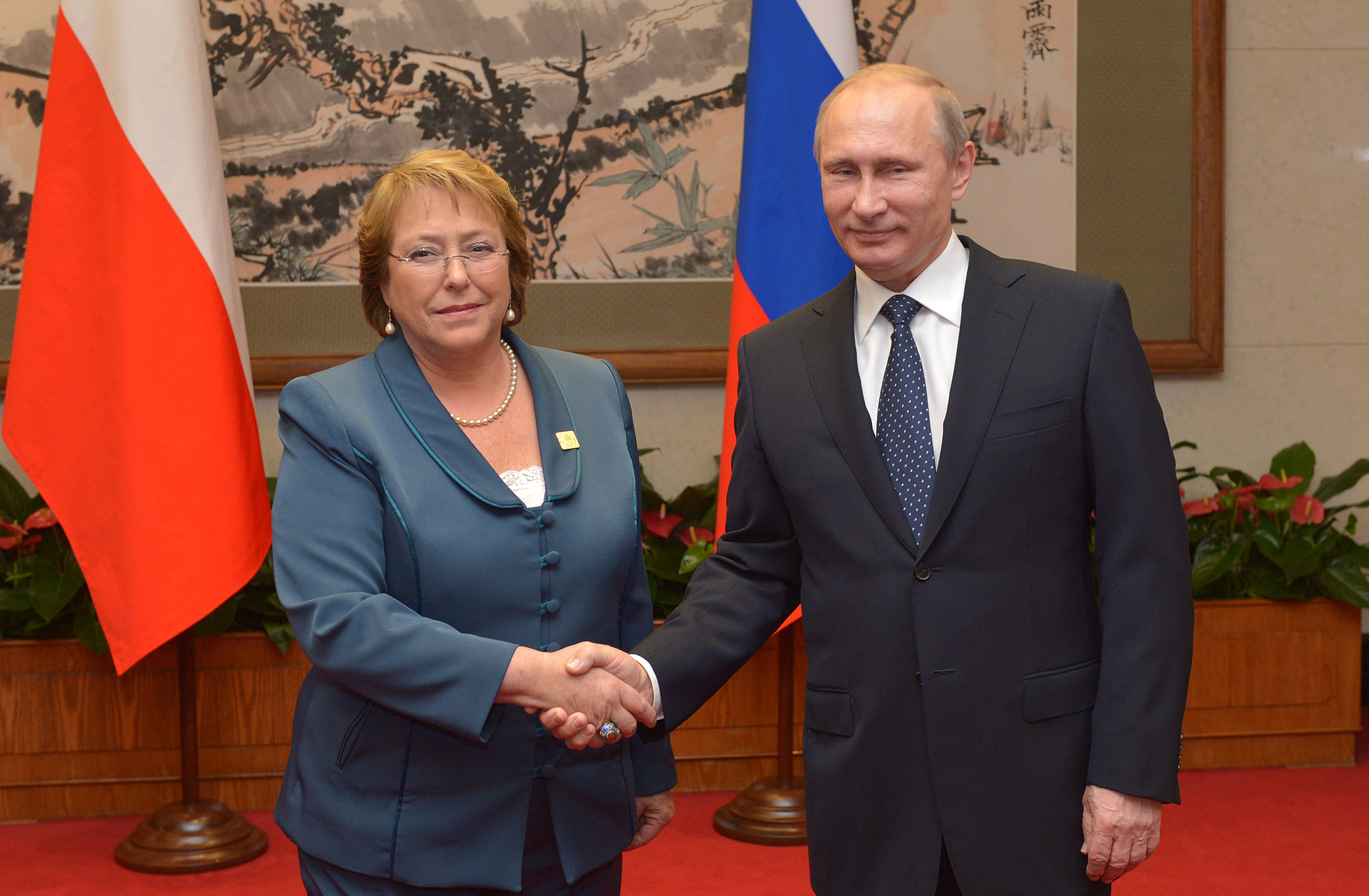 Gobierno de Chile